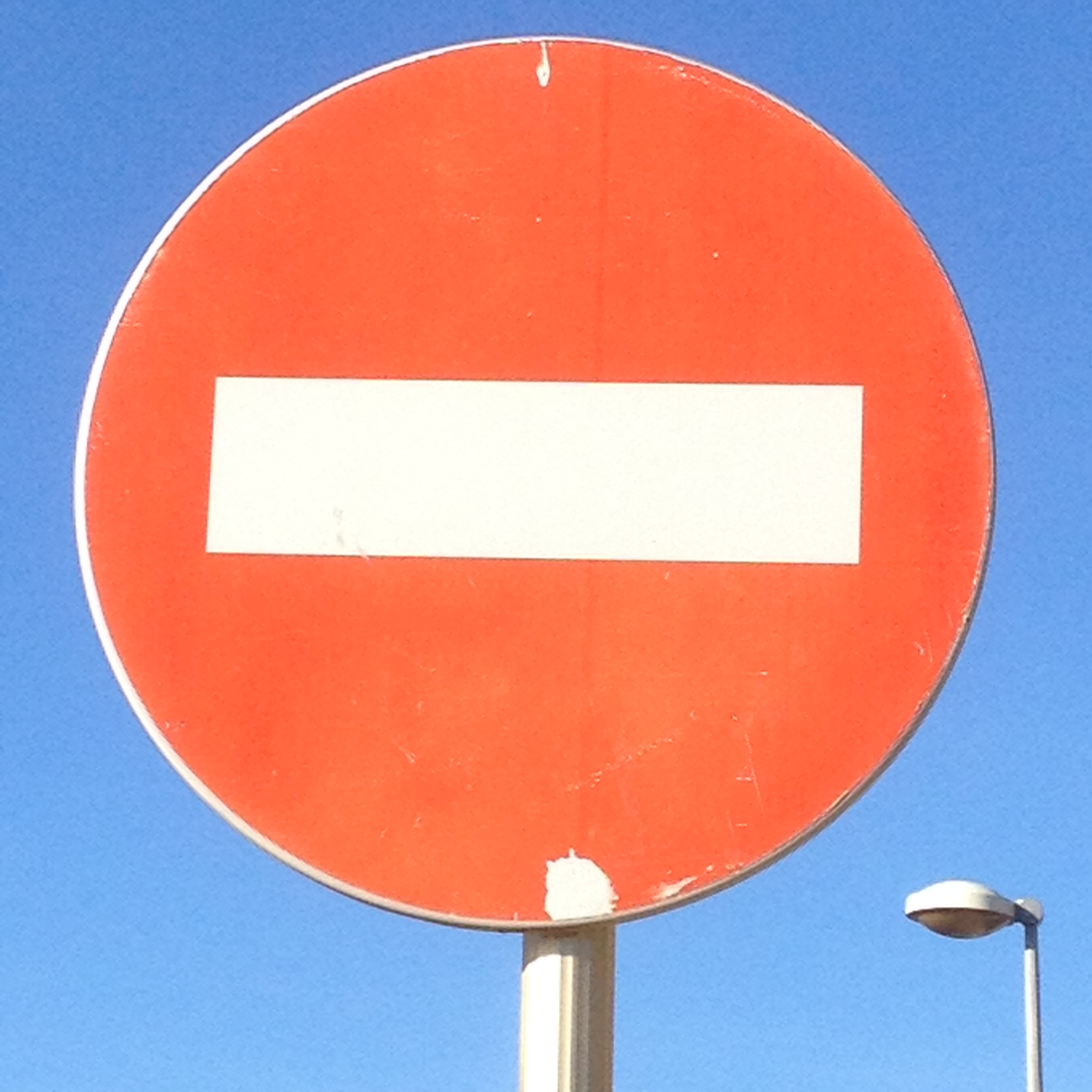 Una señal de prohibido el paso.